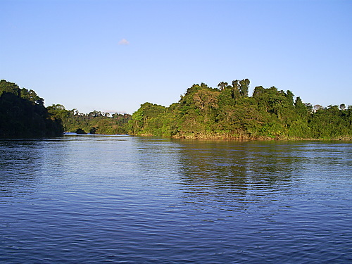 Rio Novo,area não poluida pelo garimpo.